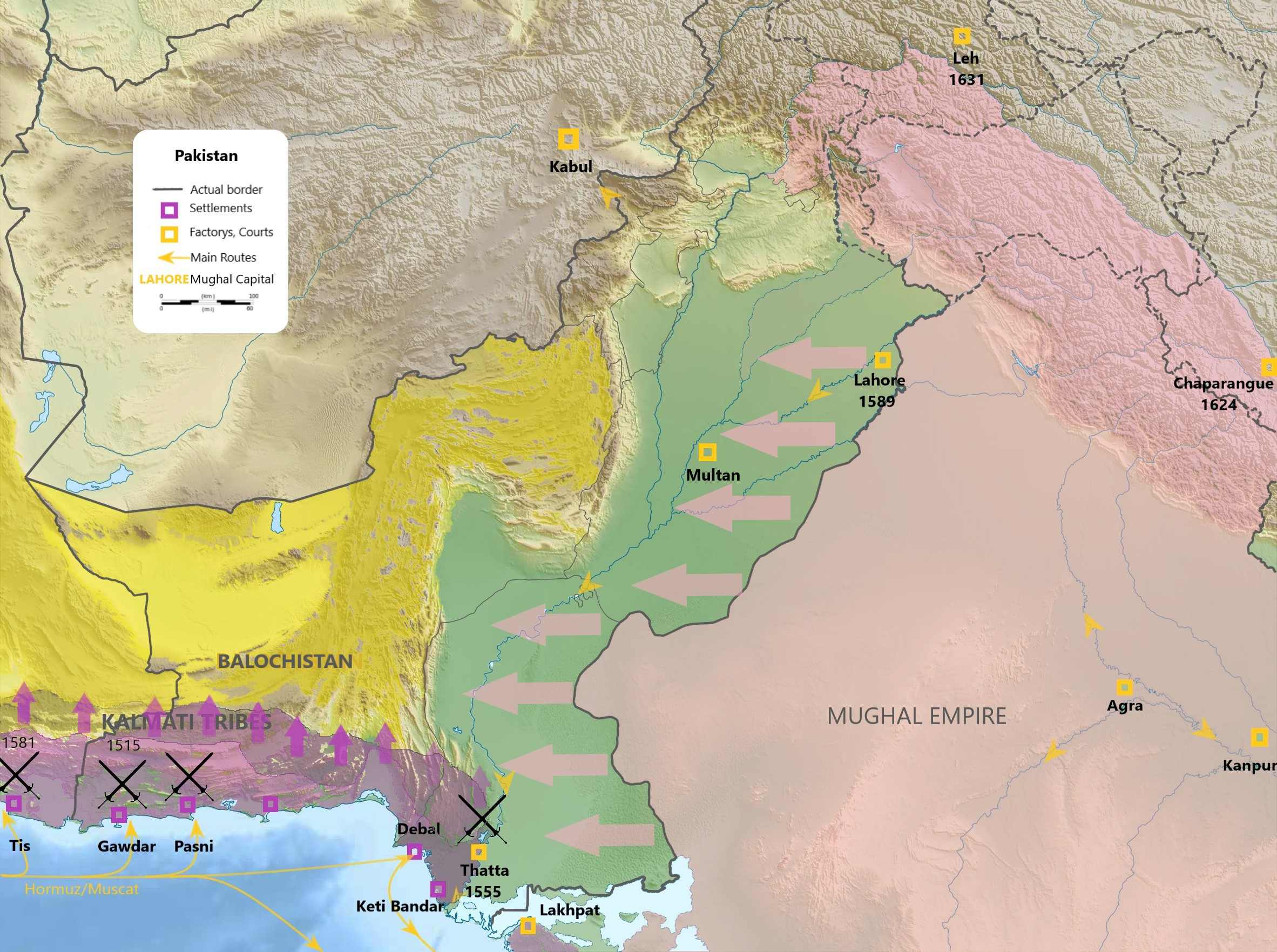 Presença Portuguesa no Paquistão e relação com a expansão com o império Mogol